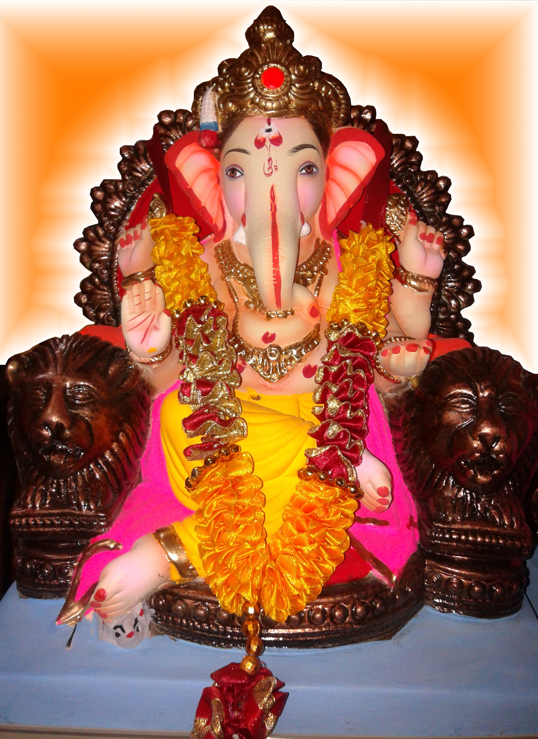 Ganapati